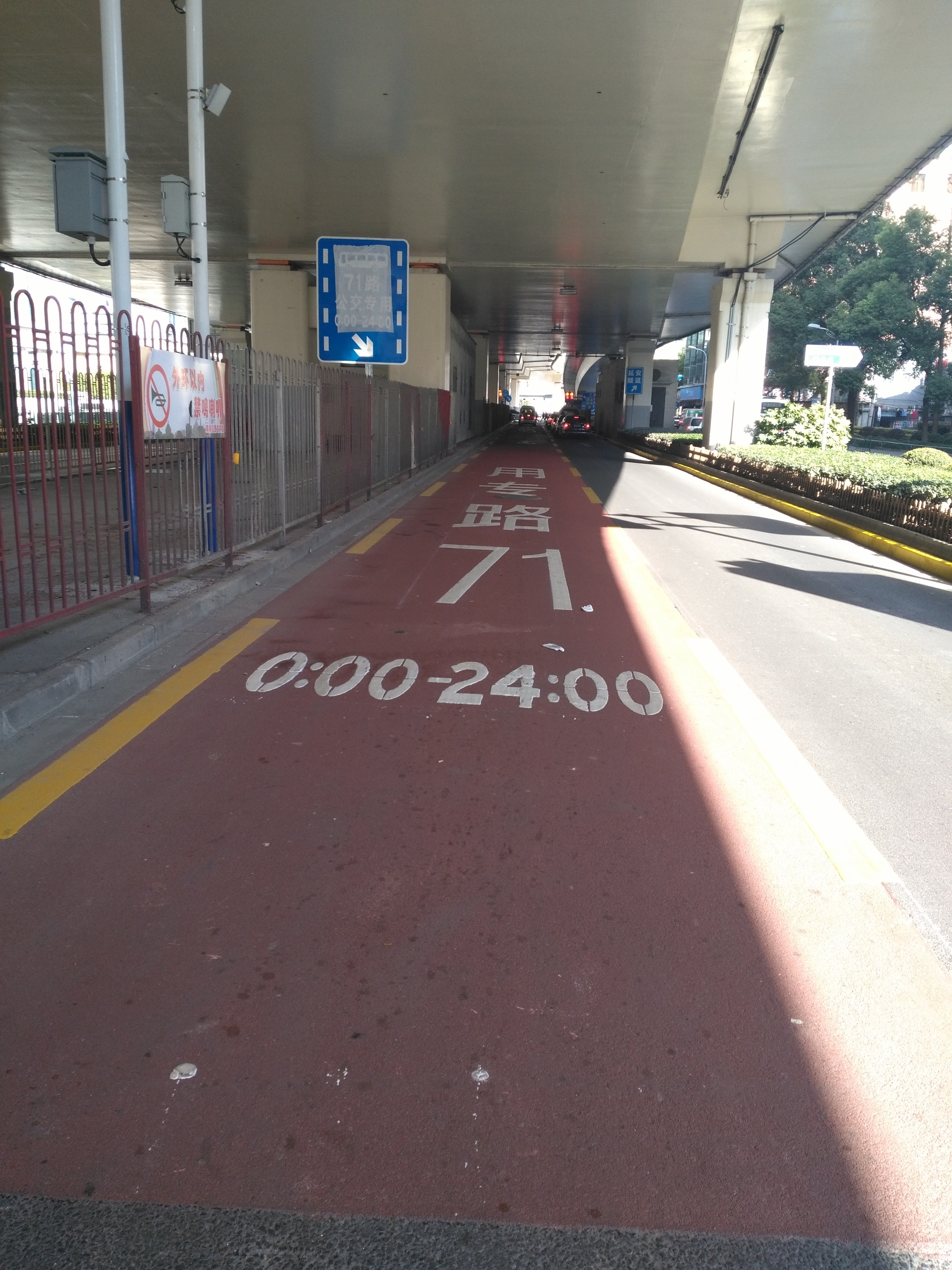 中文（中国大陆）: 延安路中运量系统工程之公交专用道（广西路—永寿路）